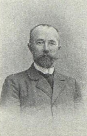 Josef Komárek (1854-1919), rakouský a český rolník a politik